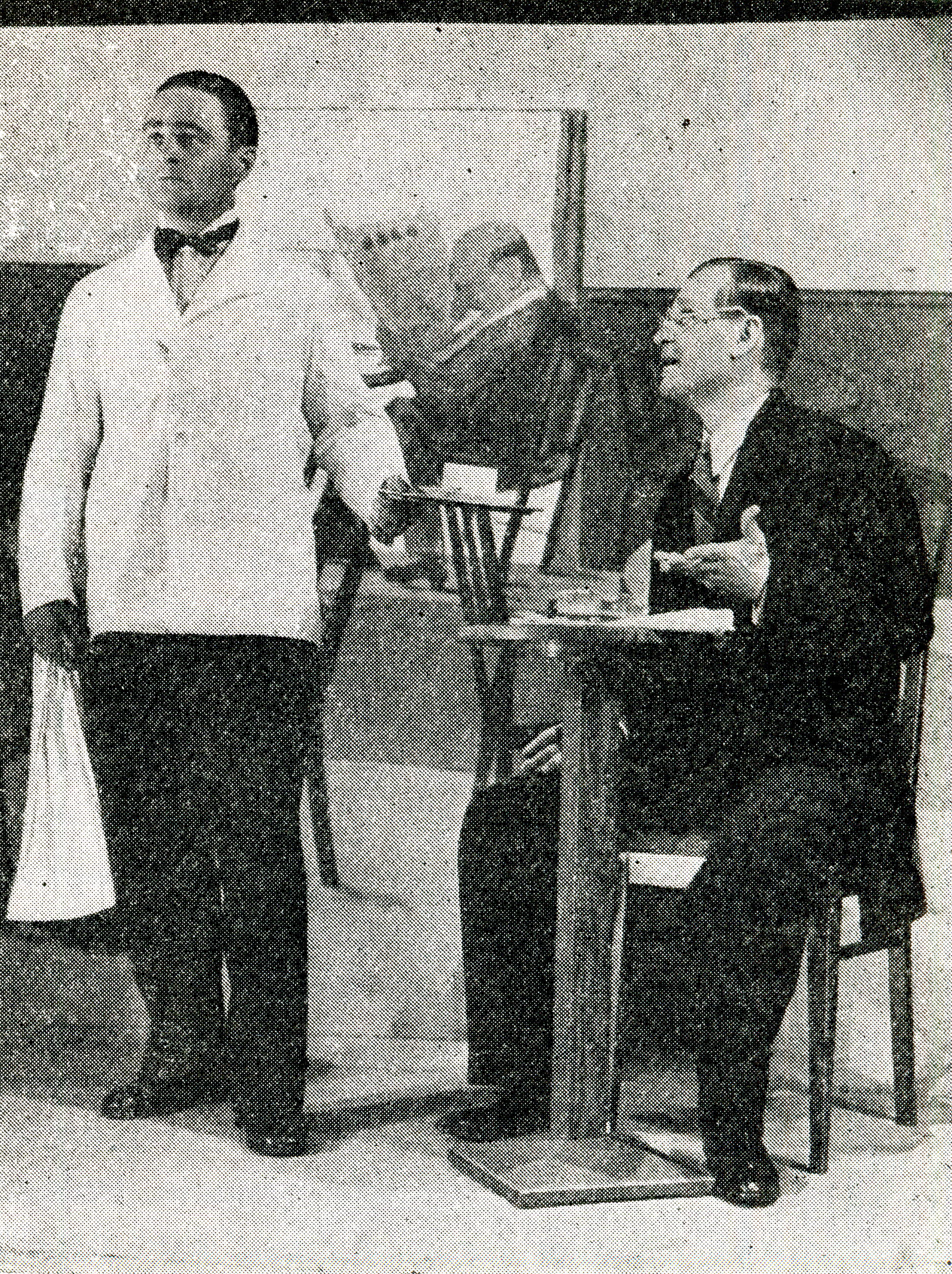 Adolf Dymsza i Wsiewołod Orłow w skeczu 1/2 czarnej w teatrze "Małe Qui Pro Quo".